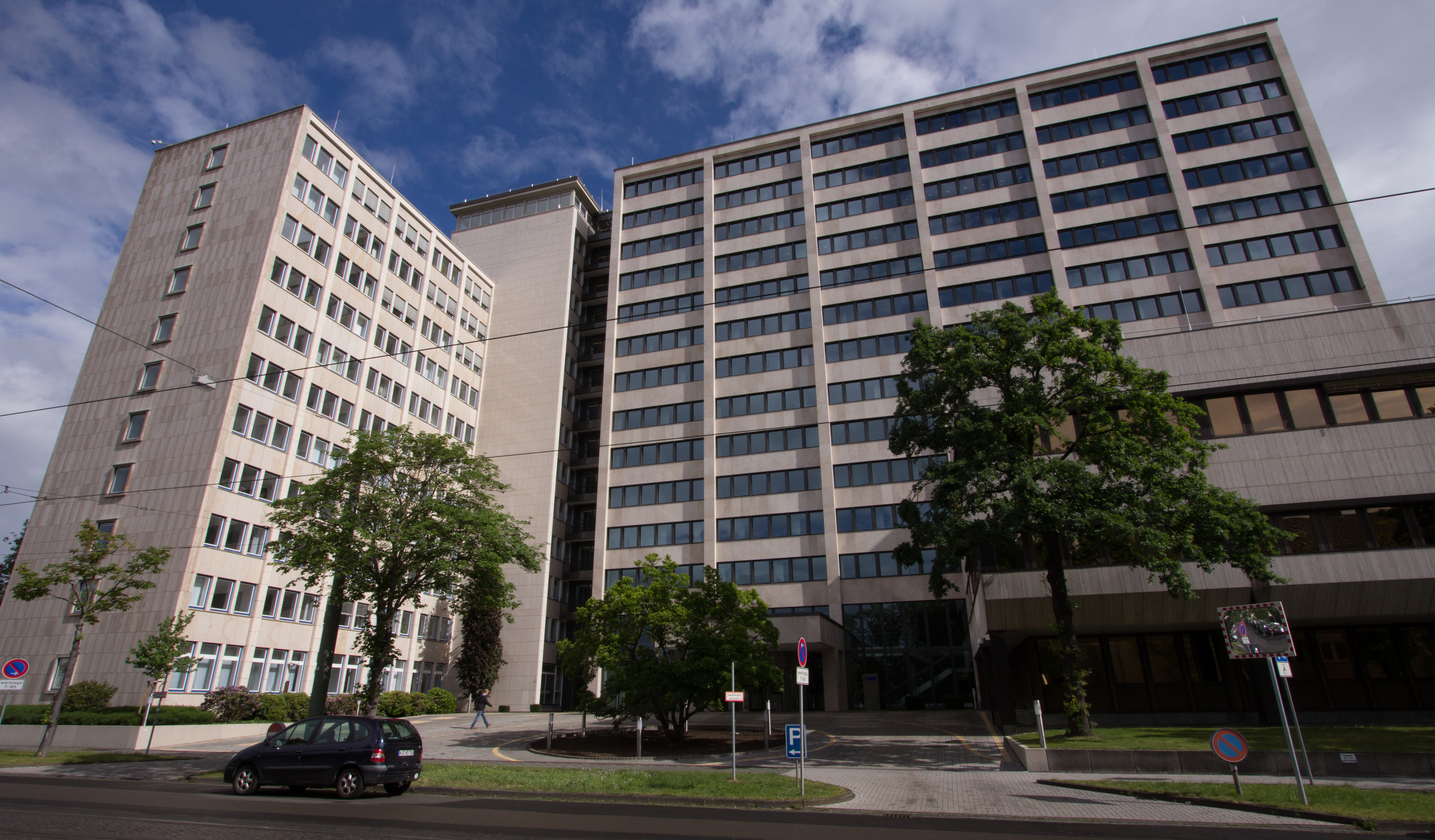 Stadhalle Kassel